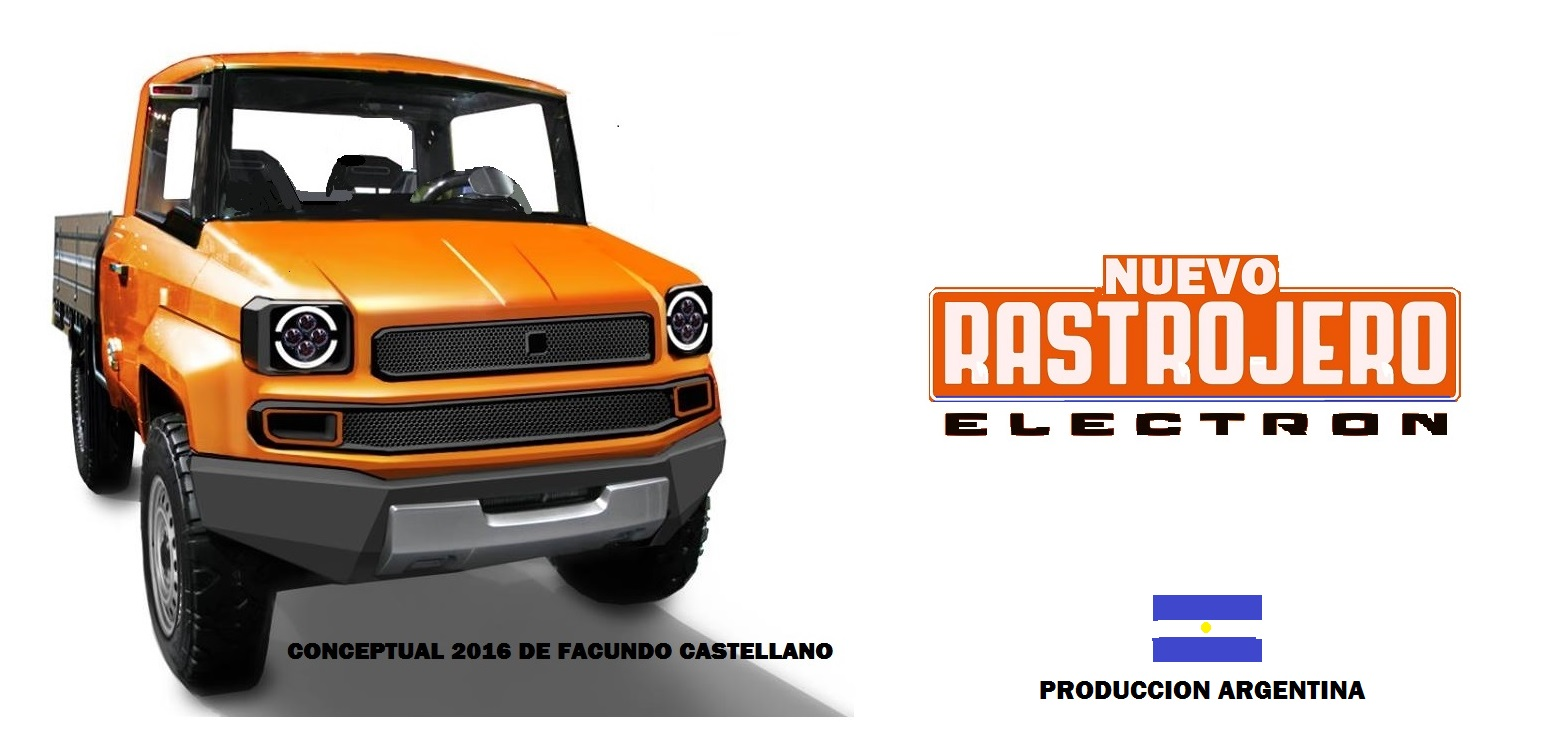 nueva version Facundo Castellano Davila.